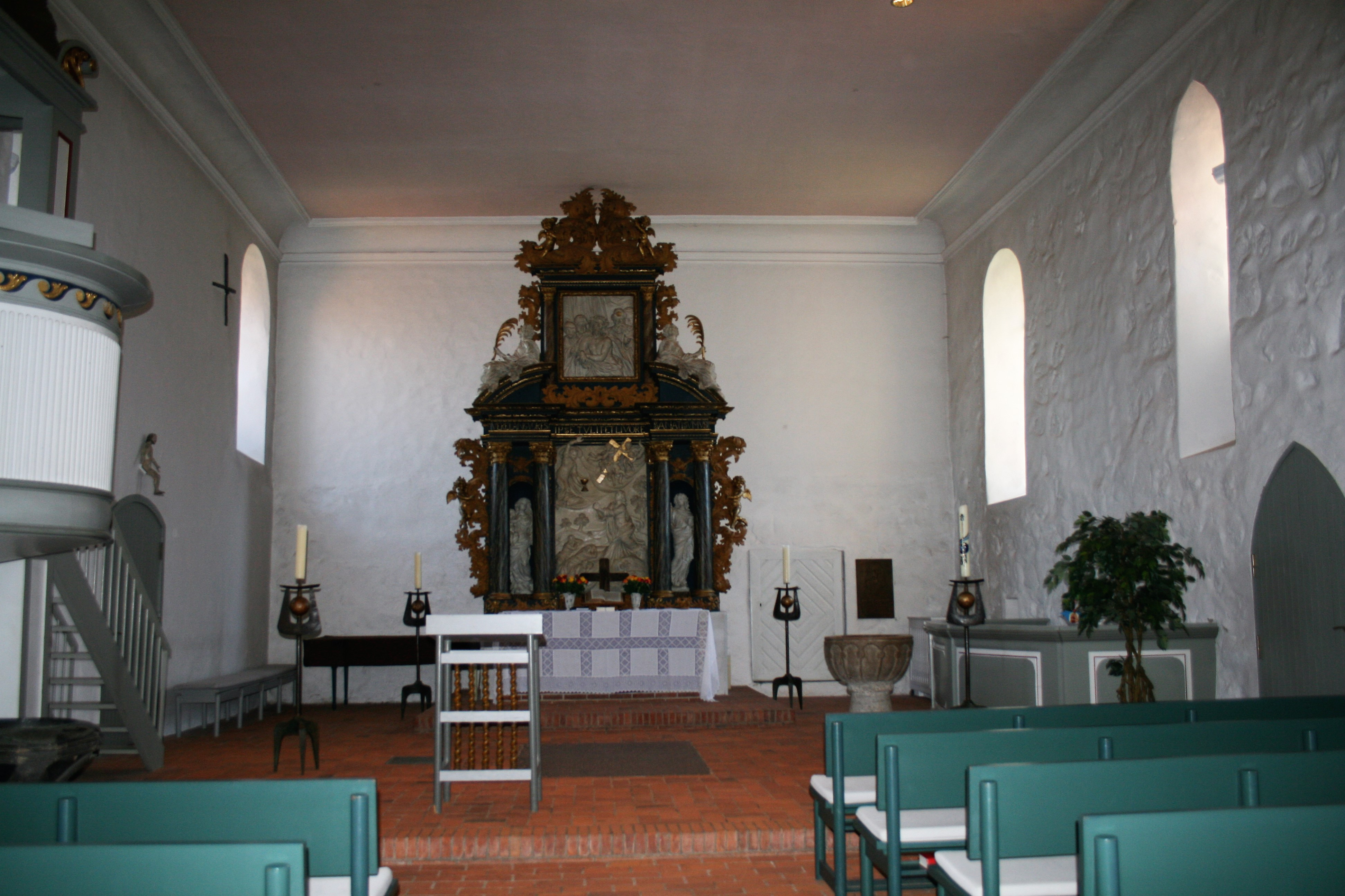 Innenraum der Georg-und-Mauritius-Kirche in Flemhude (Schleswig-Holstein)